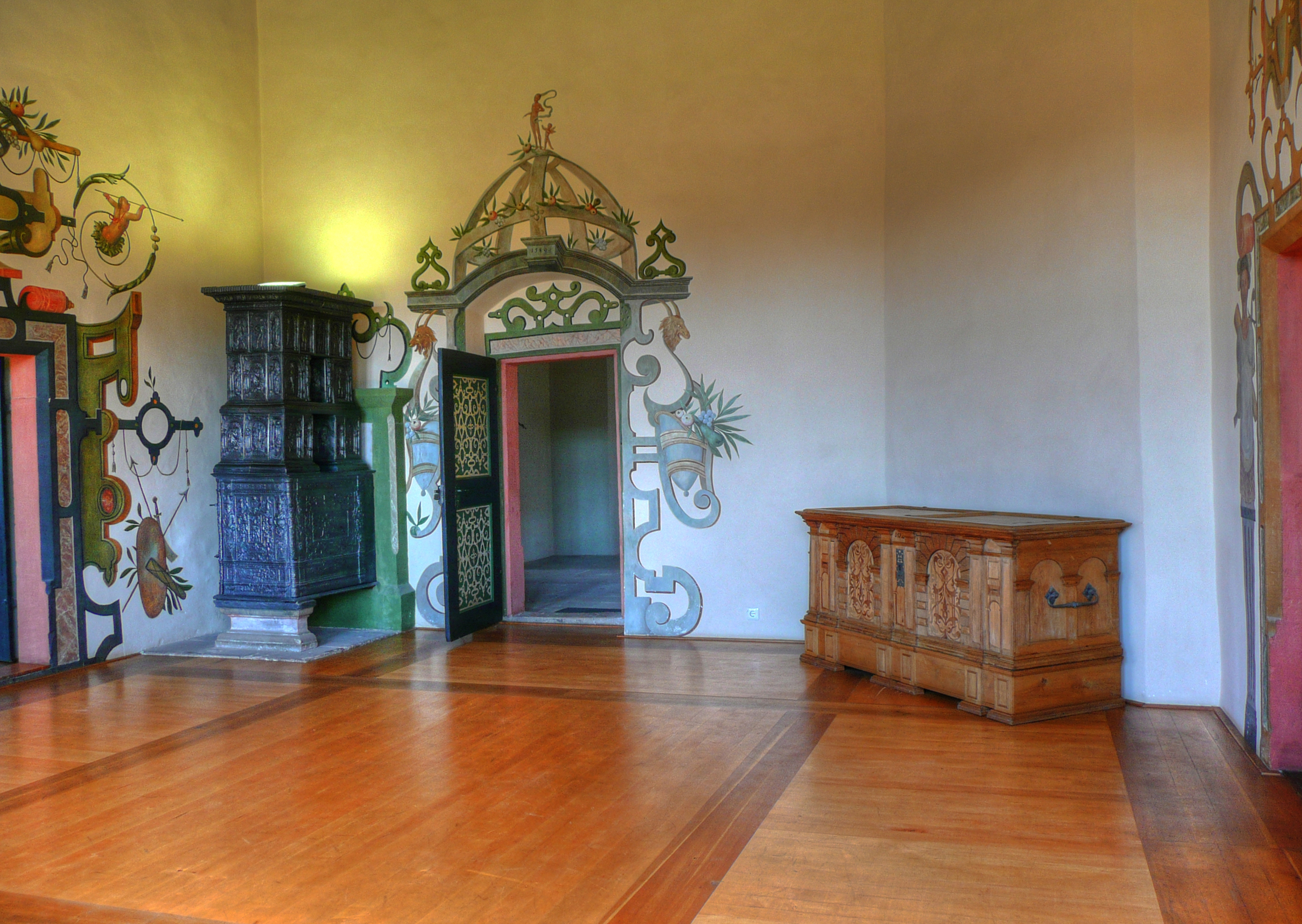 Innenraum auf Schloss Wilhelmsburg